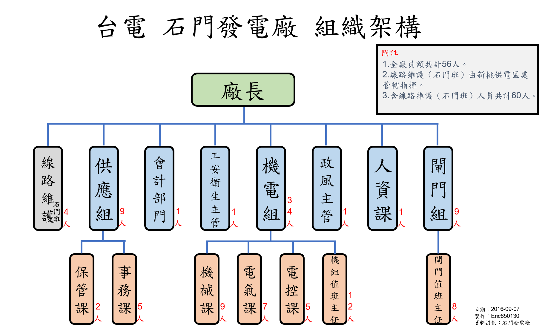 中文（台灣）: 石門發電廠組織架構表